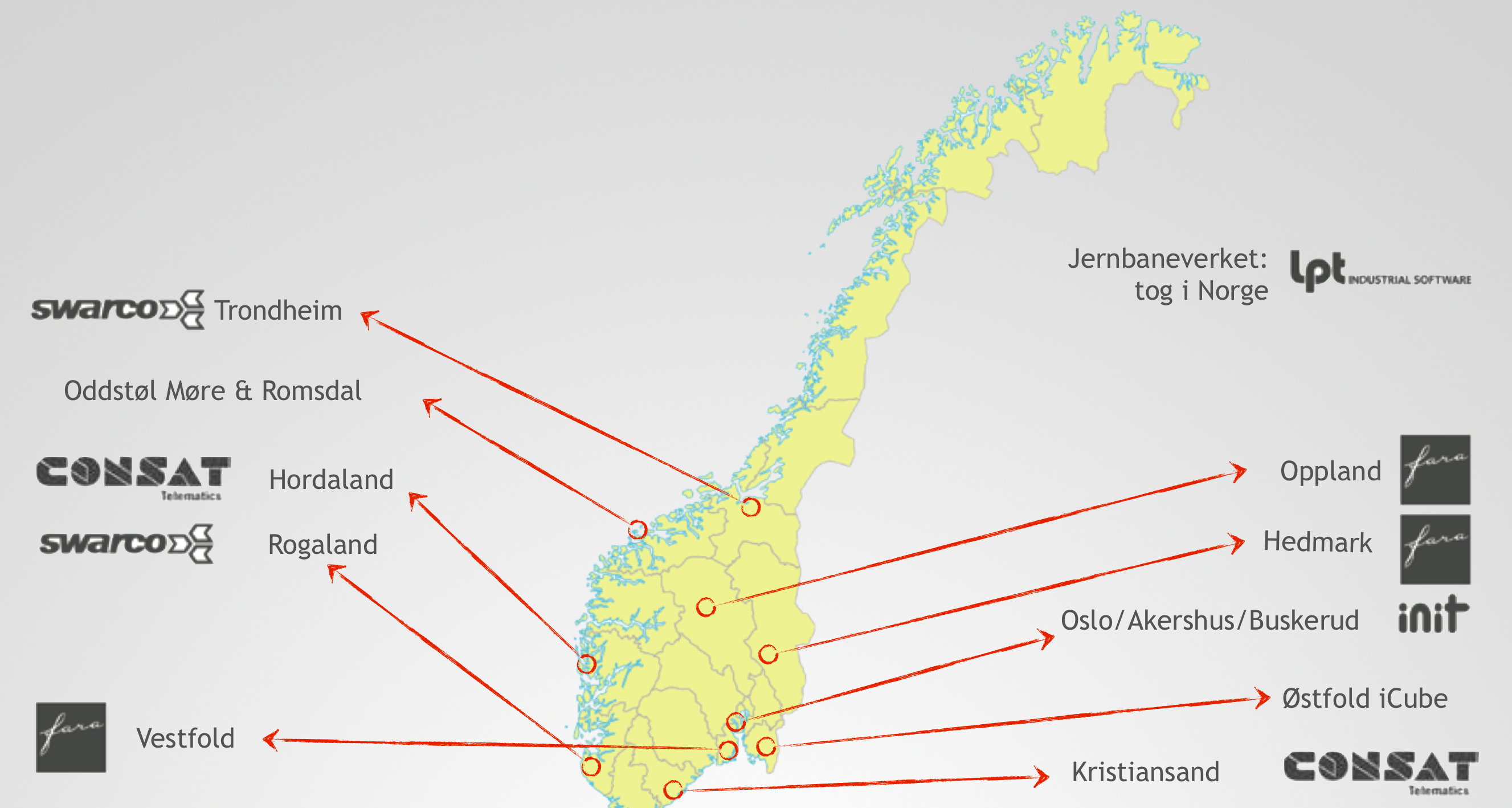 Oversikt over sanntidssystem i kollektivtrafikk i Norge